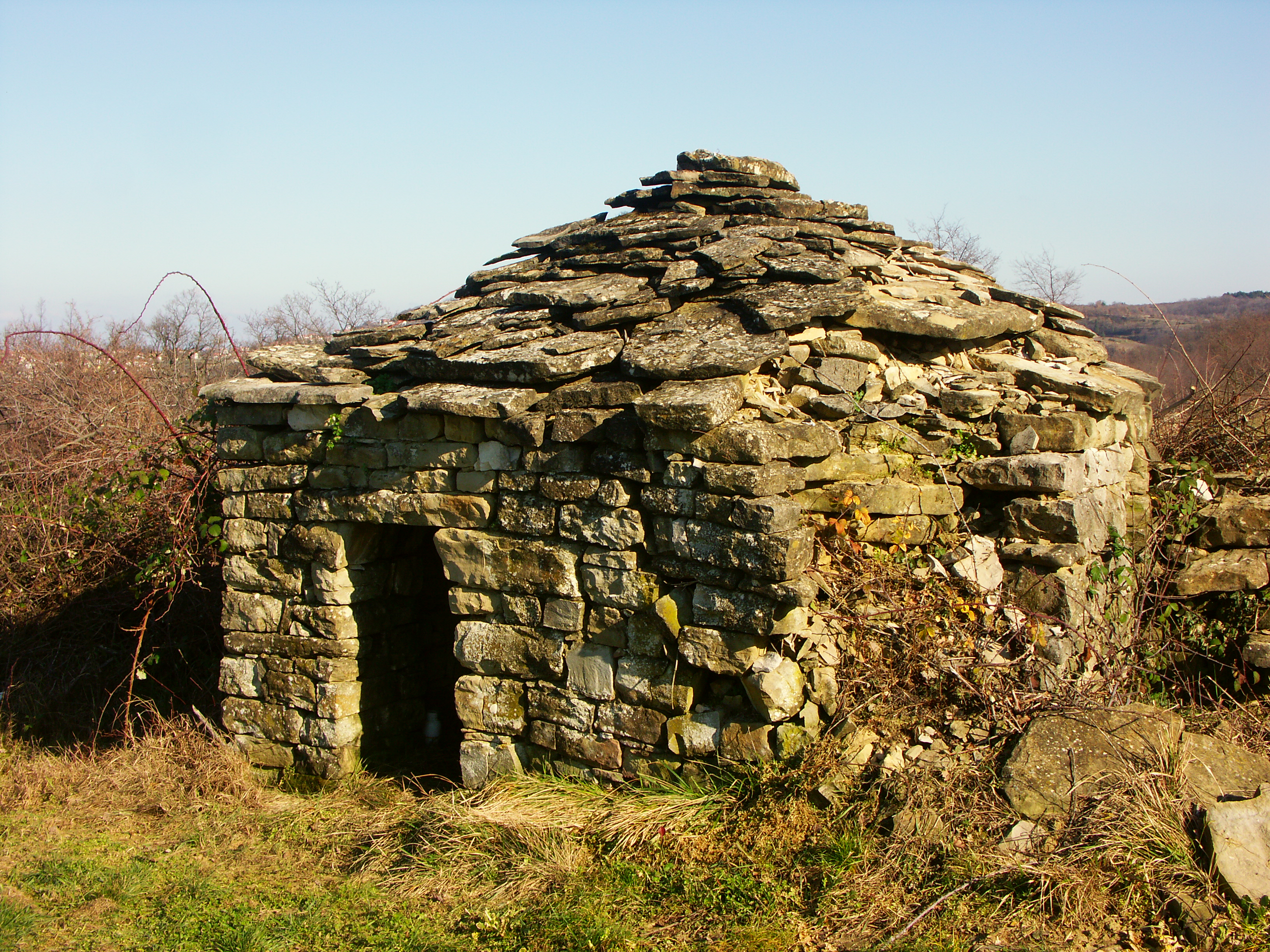 Pastirska hišica - kažun